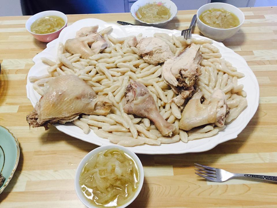 Жижиг-галнаш с курицей This file, which was originally posted to was reviewed on 14 September 2016 by the administrator or reviewer INeverCry, who confirmed that it was available there under the stated license on that date.